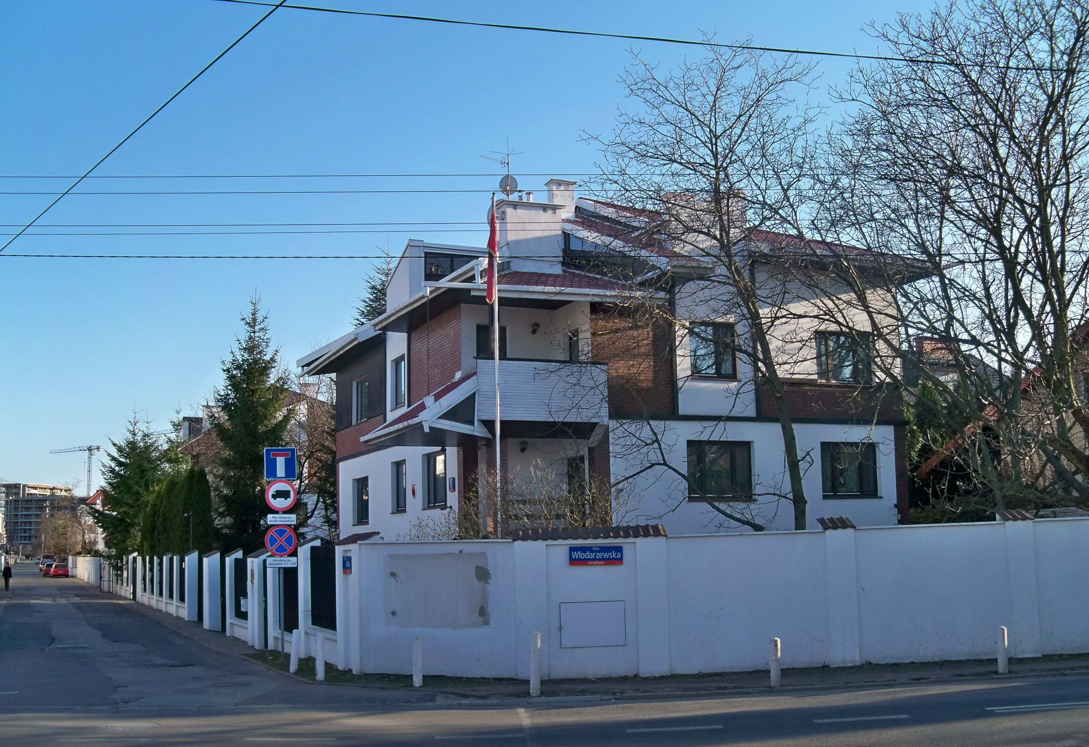 Ambasada Albanii w Warszawie, ul. Altowa 1